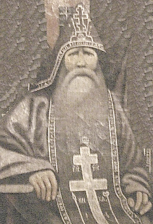 Филипп Хорев (до пострижения Филипп Андреевич, в монашестве — Филарет, 1802—1869) — схимонах Русской православной церкви, основатель Пещерной обители и киновии Боголюбовой Богоматери при Гефсиманском ските, близ Свято-Троицкой Сергиевской лавры.